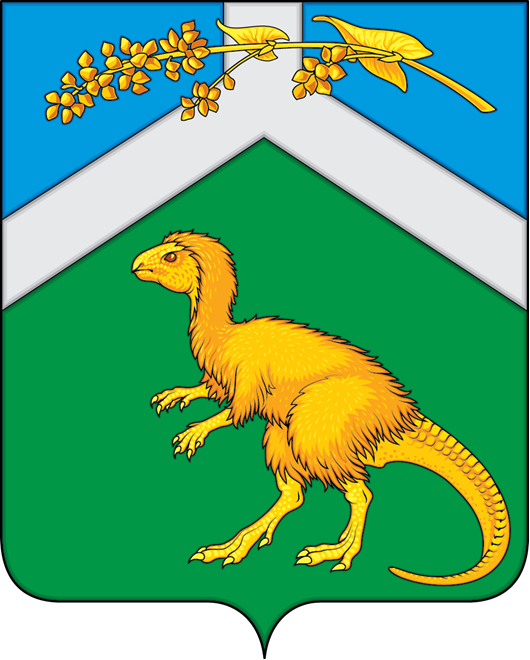 Герб Чернышевского района Забайкальского края, Россия.